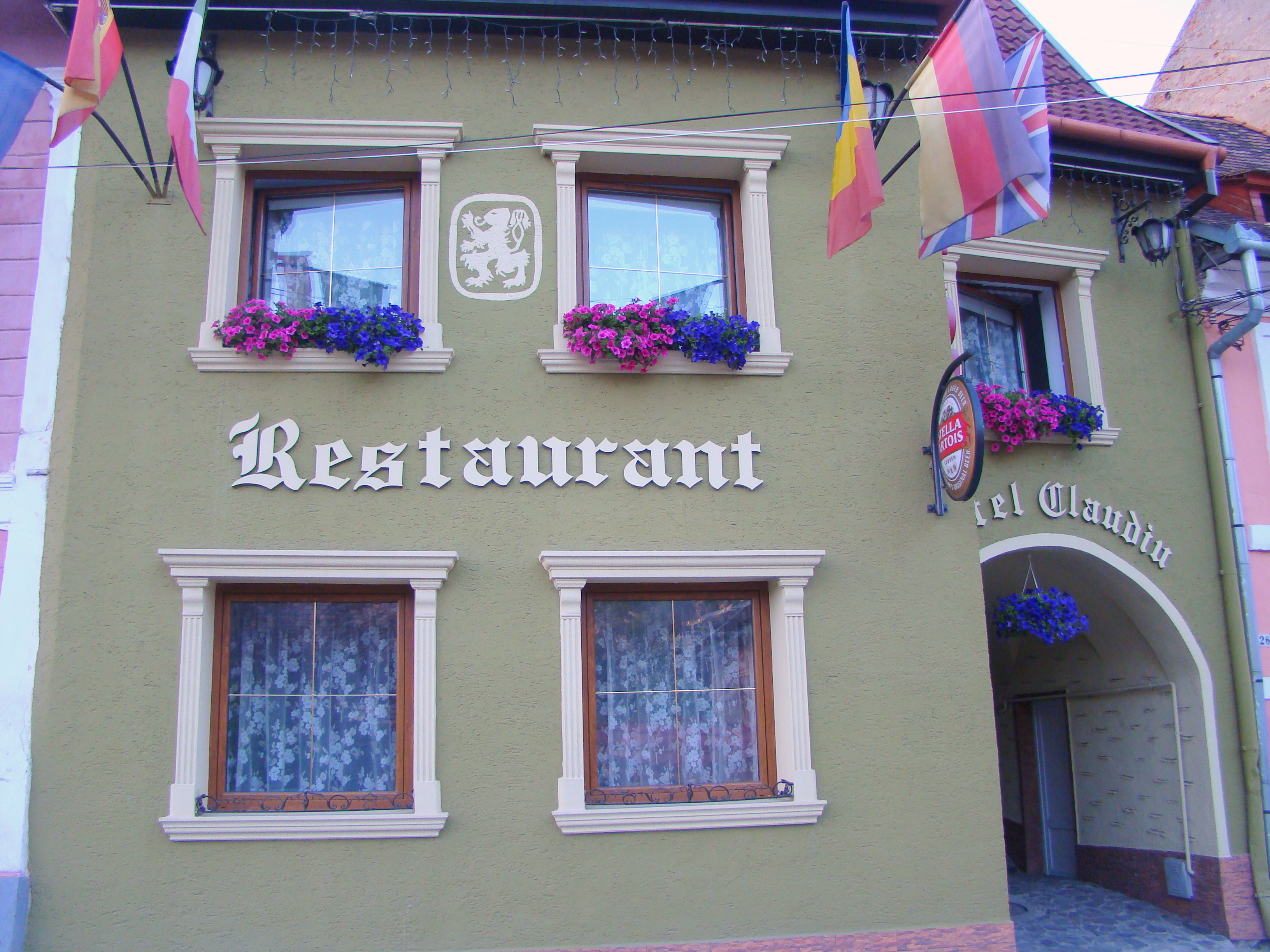 Casă, municipiul Sighișoara, str. Chendi Ilarie 28 1826